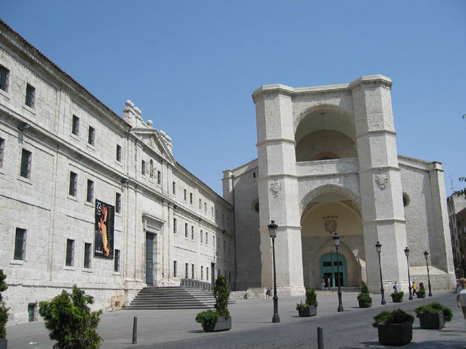 Valladolid (Spain) - Iglesia de San Benito: El templo actual se comenzó a construir por Juan de Arandia en 1499.La fachada corresponde a Juan de Ribero, así como el claustro procesional construido en 1584. En 1591 se hizo cargo de las obras Juan Martínez del Barrio.El conjunto se finalizó en el siglo XVIII.